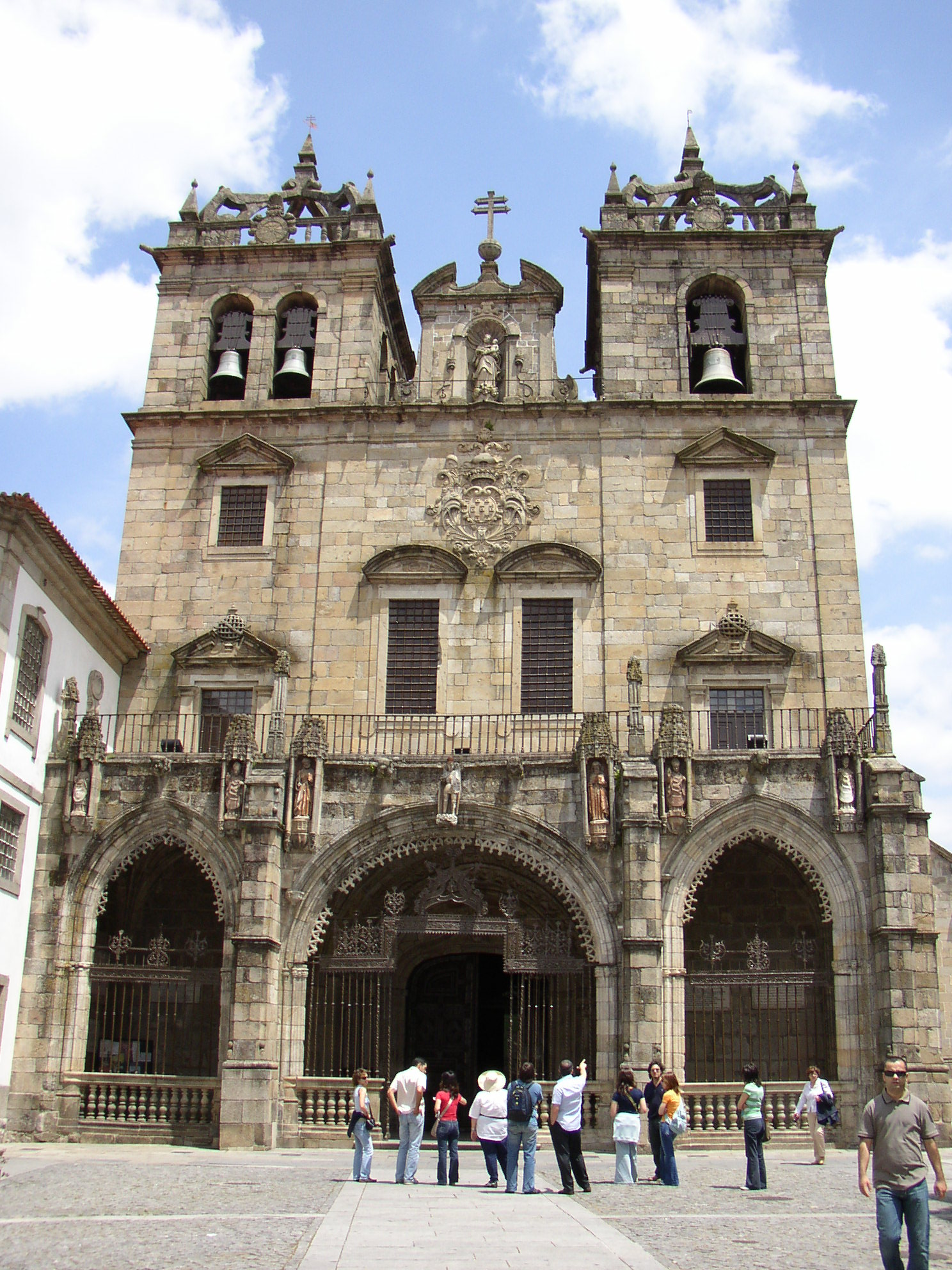 Sé de Braga This file was uploaded for Wiki Loves Monuments in Portugal with the unique identifier 70462.